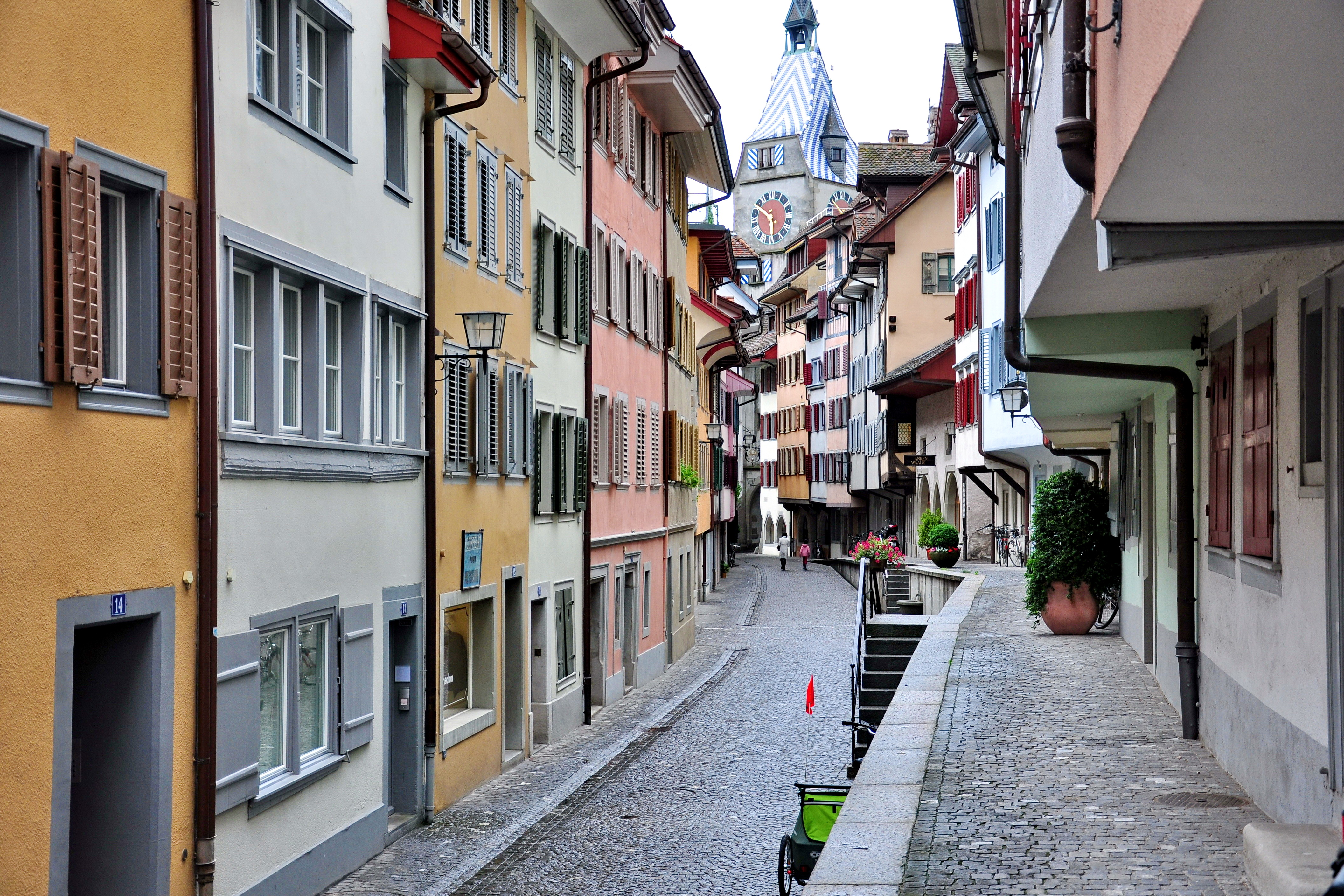 Oberstadt & Zytturm in Zug (Switzerland)